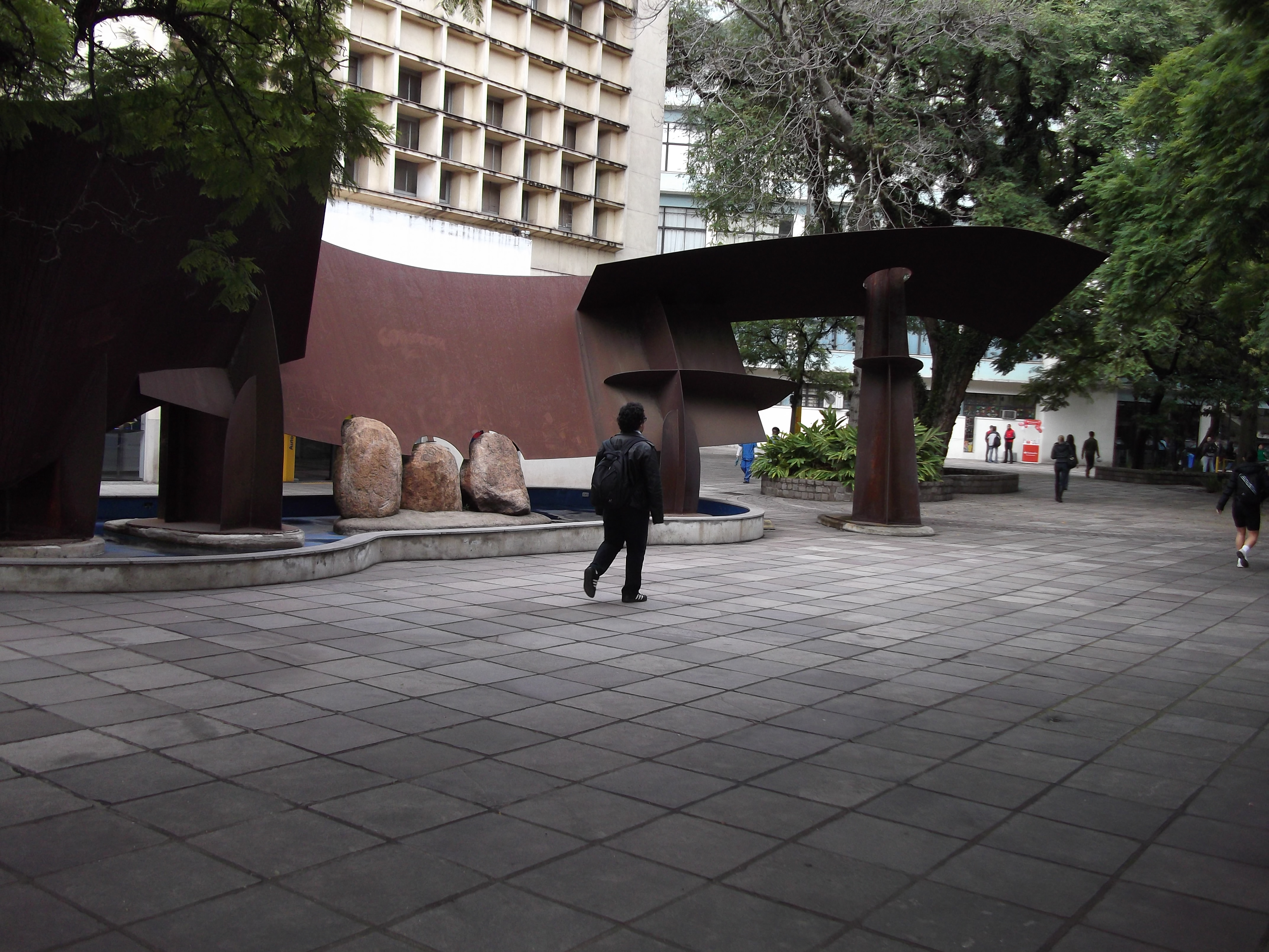 Universidade Federal do Rio Grande do Sul : Campus Central : Escultura